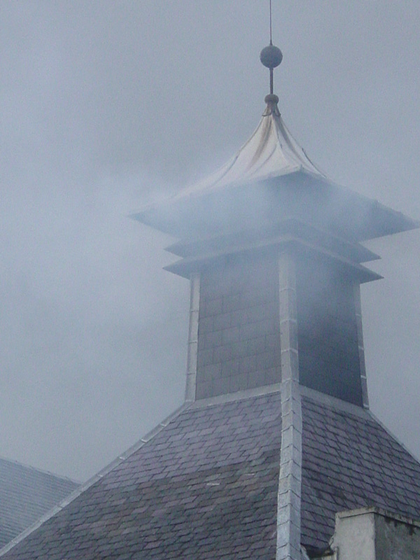 The distinctive chimney of a Single Malt Scotch kiln at the Laphroaig distillery on Islay in Scotland. Česky: Klasická věž skotské palírny, která dříve sloužila k odvodu páry a kouře